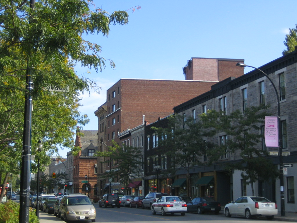 Notre-Dame Street West in Montréal, in quartier la Petite Bourgogne